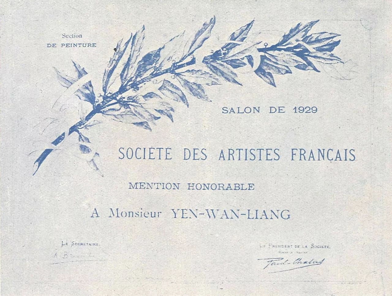 法國沙龍1929